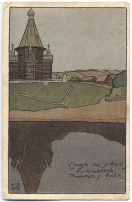 «Спас на реке Кокшенге, Тотемского уезда Вологодской губернии» И.Билибин 1904г В пользу Общины Св. Евгении Литография Кадушина С.П.Б.